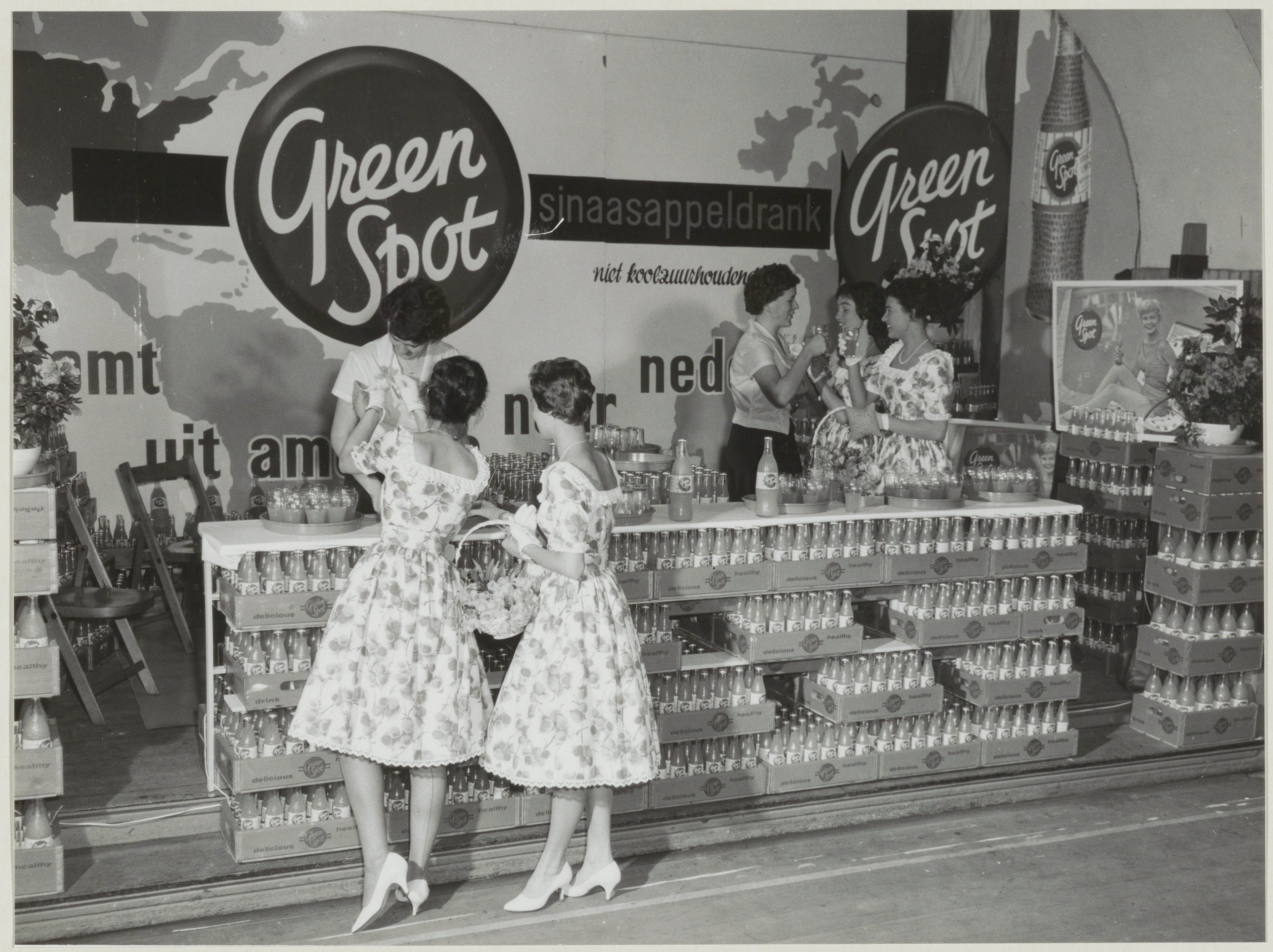 CollectieCollectie Fotoburo de BoerInventarisnummerNL-HlmNHA_54010545BeschrijvingBloemenmeisjes bij de stand van de Amerikaanse frisdrankfabrikant Green Spot op de Haarlemse voorjaarsbeurs in het Krelagehuis.FotonummerNL-HlmNHA_1478_3760DocumenttypeHistorieprenten, tekeningen en foto'sVervaardigerBoer, Cees de (1918-1985) Soort vervaardigerFotograaf Interieur/ExterieurInterieurAnnotatiesH65LandNederland ProvincieNoord-Holland GemeenteHaarlem PlaatsHaarlem StraatLeidsevaart GeografischLeidsebuurt Begindatum1960Einddatum1960TechniekFoto Trefwoordenbeurzen, Bloemenmeisjes, Interieurfoto's